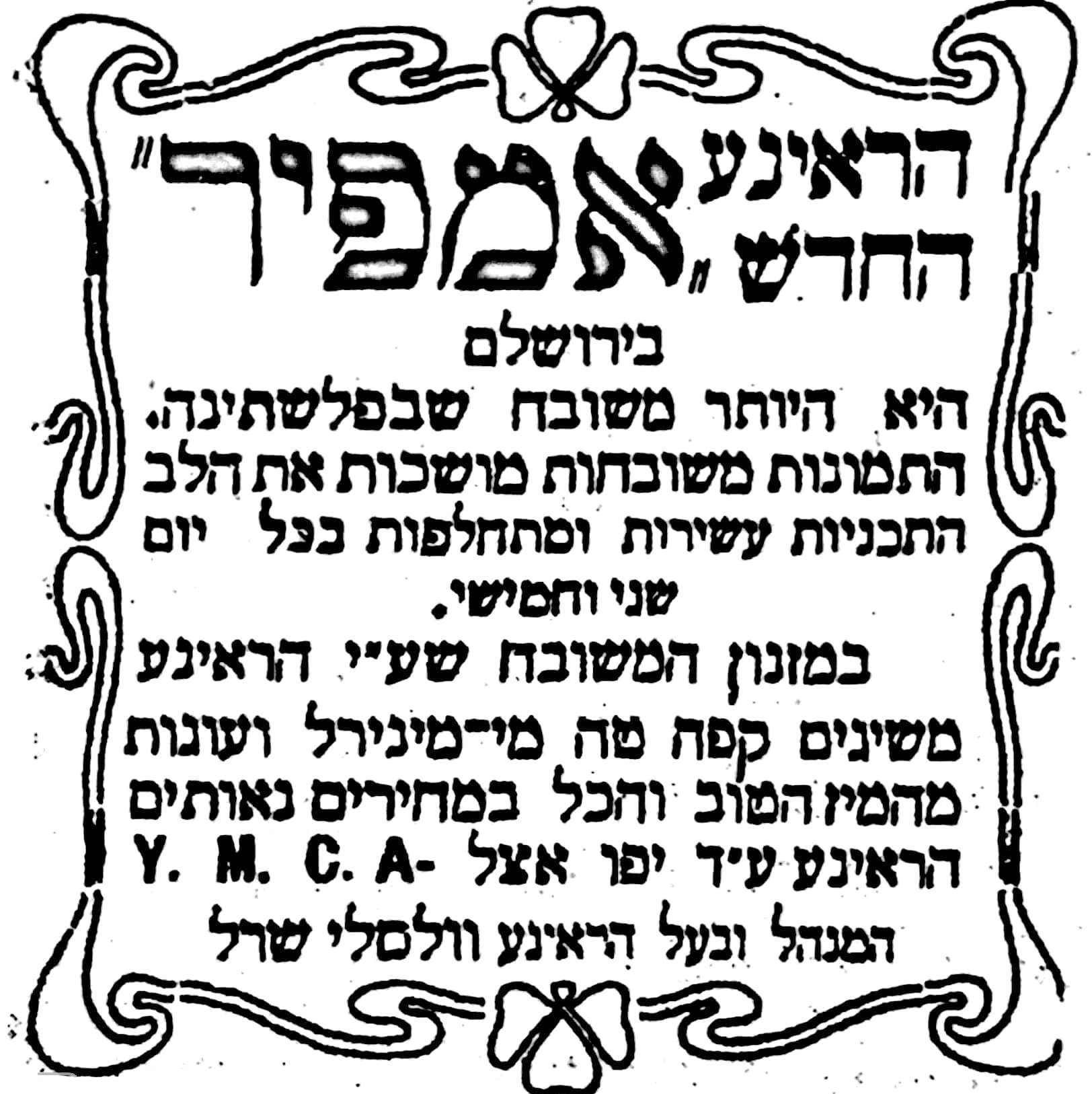 מודעת פרסומת לראינוע אמפיר בירושלים 1919